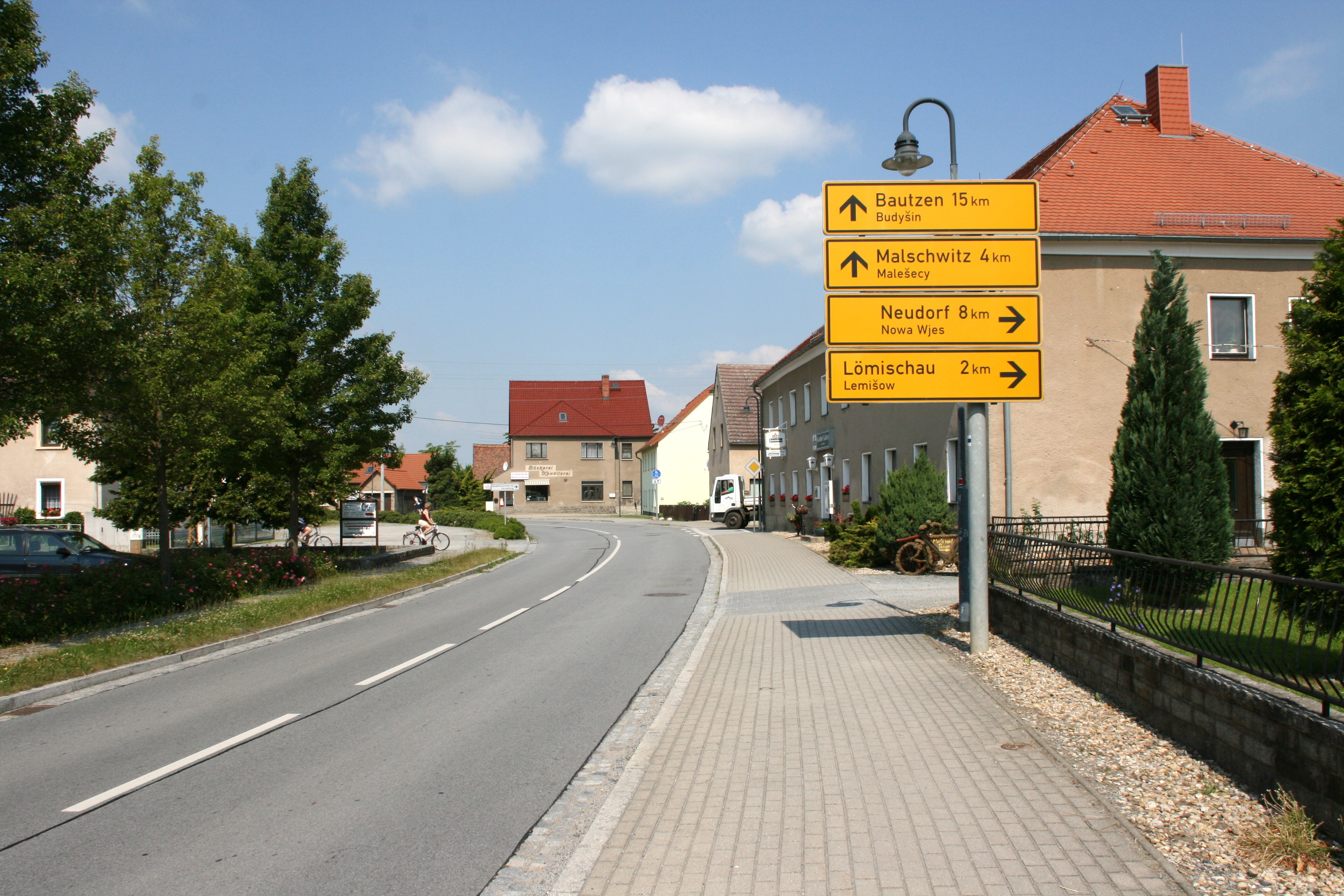 Hauptstraße in Guttau